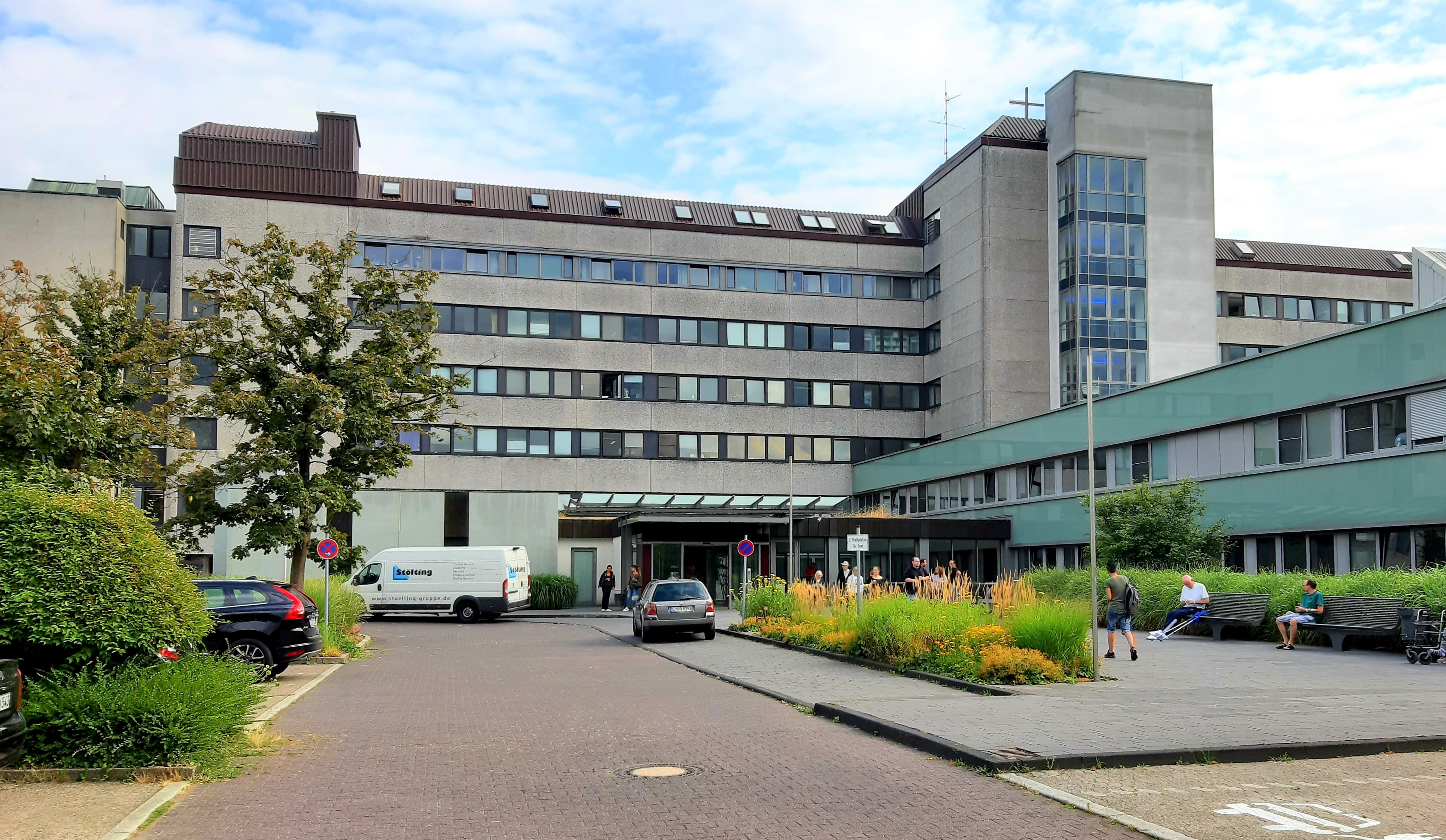 Alfried Krupp Krankenhaus in Essen-Steele, Haupteingangsbereich